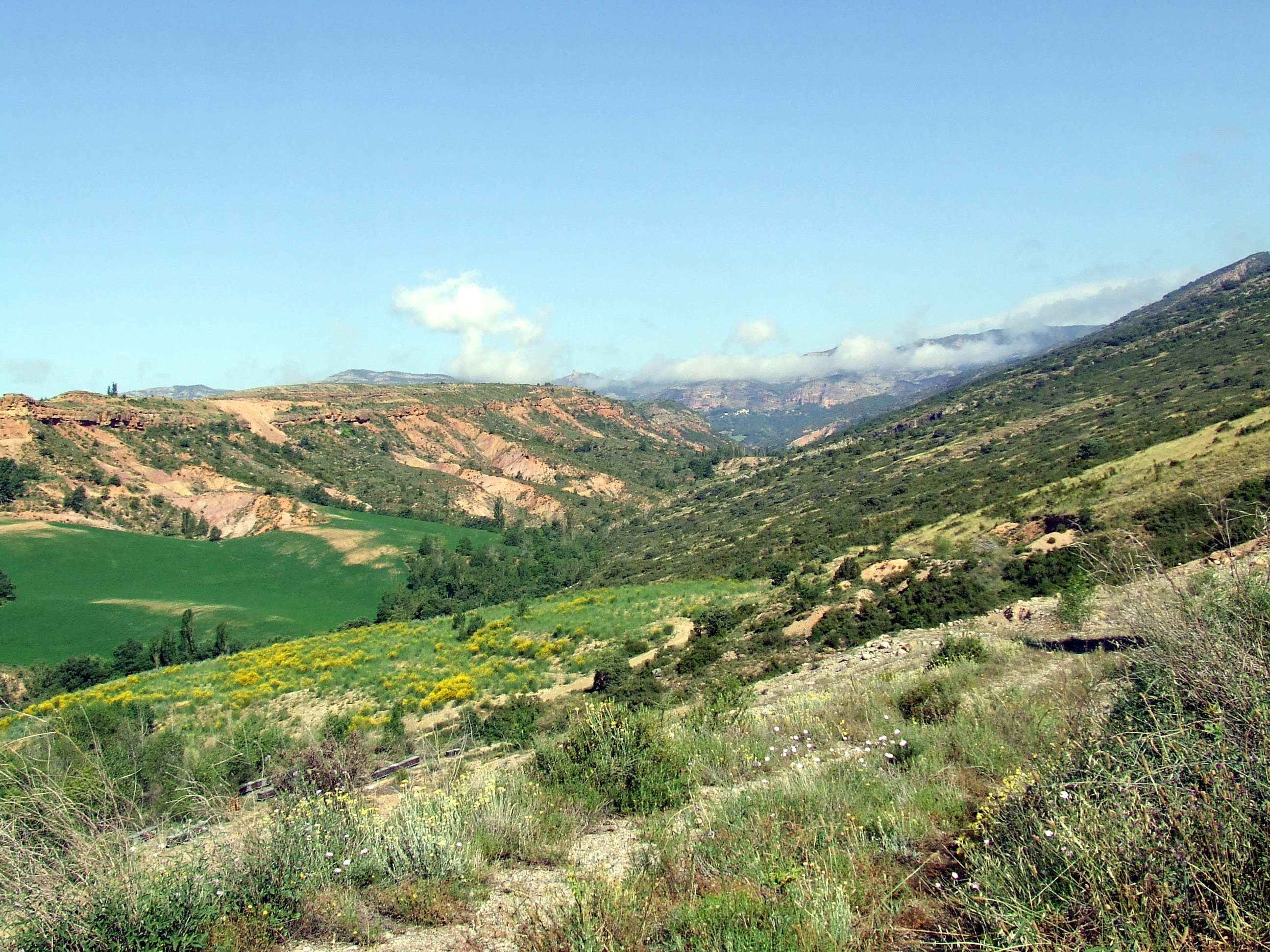 El barranc de Seròs, tram mitjà (Talarn, Pallars Jussà)